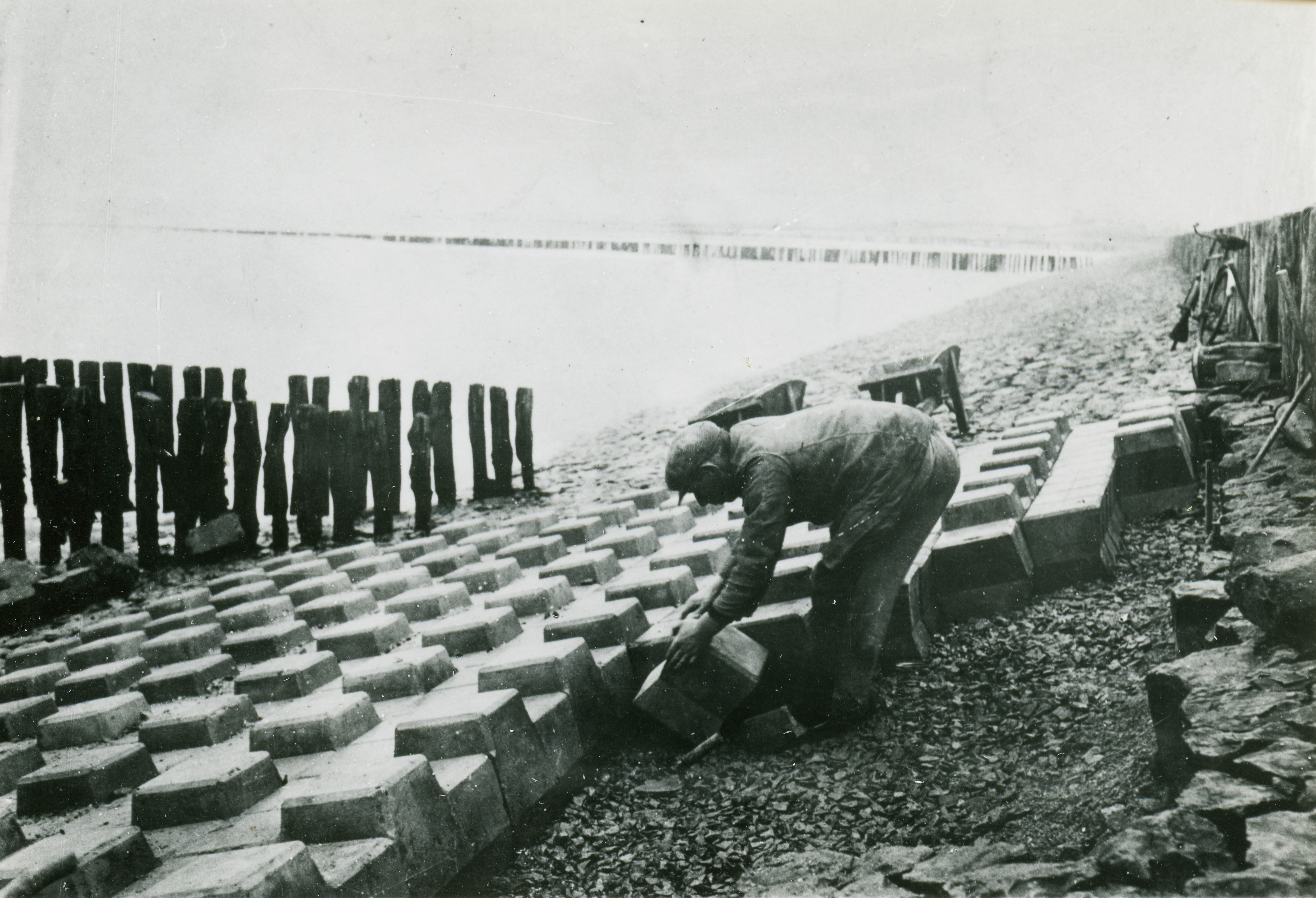 Zetten van een glooiing met het systeem van de heer Streefkerk, de diaboolglooiing. (inventarisnr: RWS-1914)